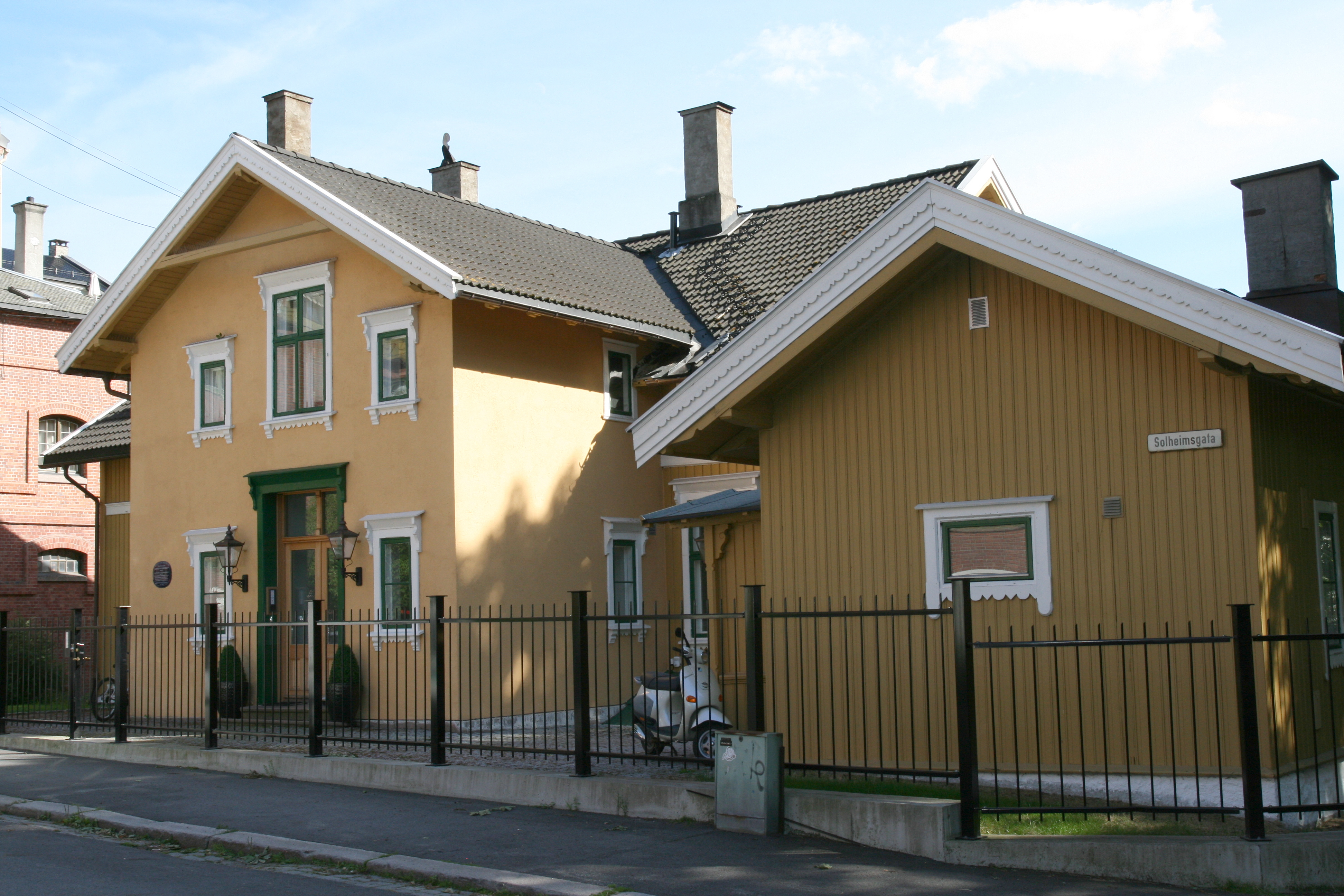 Solheimløkken (Nobels gate 33 på Frogner i Oslo). Johan Sverdrup bodde her i perioden 1865-74. Bygget var politistasjon fra 1895 til 1962.